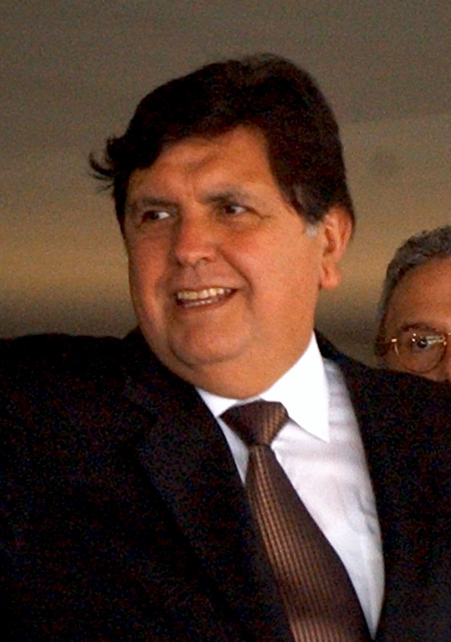 O presidente do Peru Alan García em Brasília.